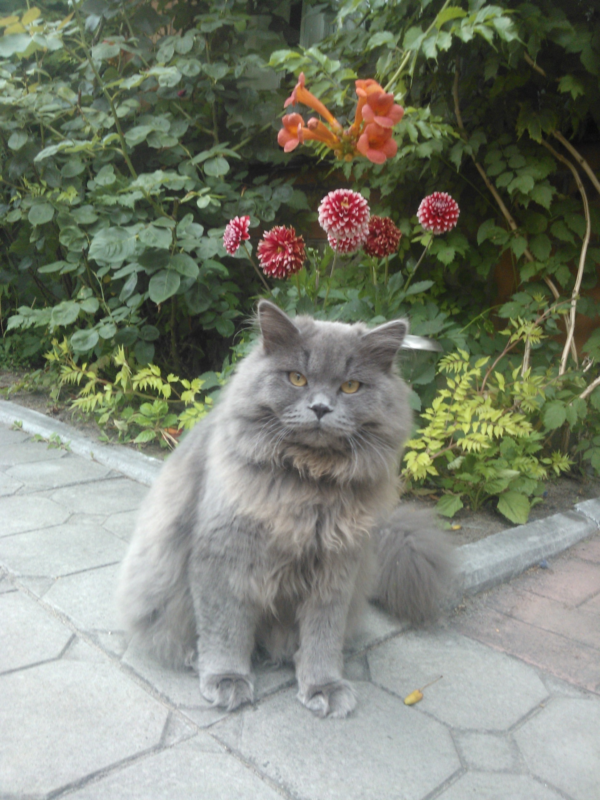 Шотландський капловухий кіт